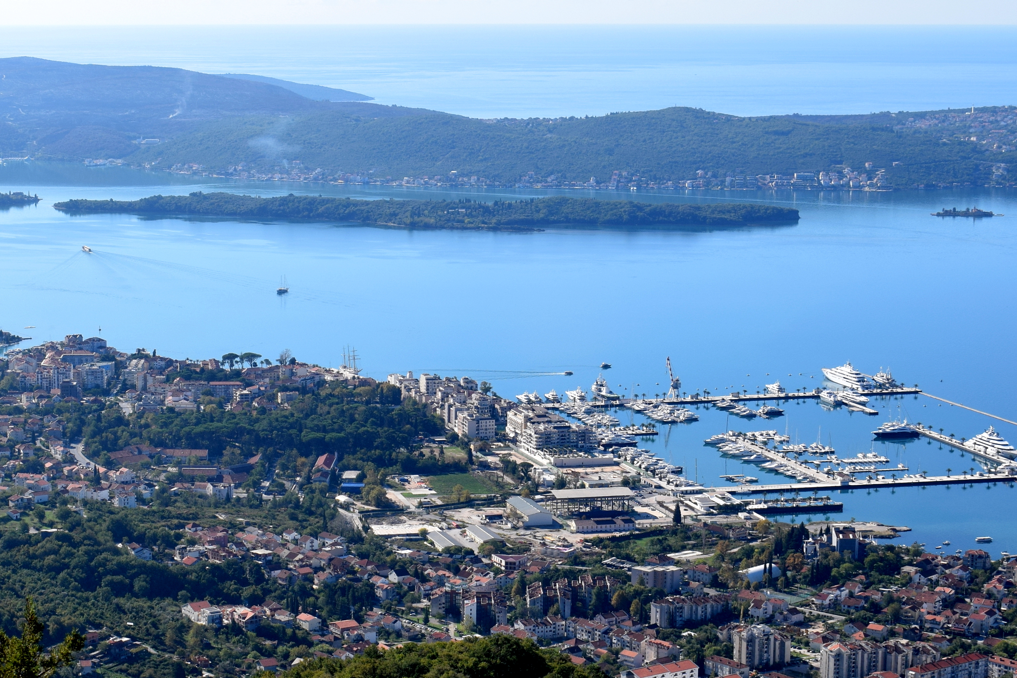 Blick auf die Bucht von Tivat mit den Inseln Sv. Marko und Gospa od Milosti, Montenegro.